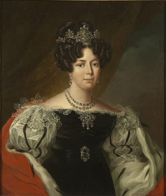 La Reina Désirée de Suecia y de Noruega (1777-1860), en un retrato oficial realizado en 1822